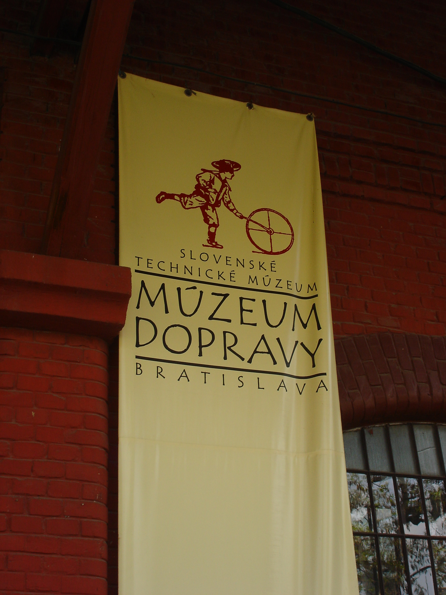 Muzeum dopravy v Bratislave